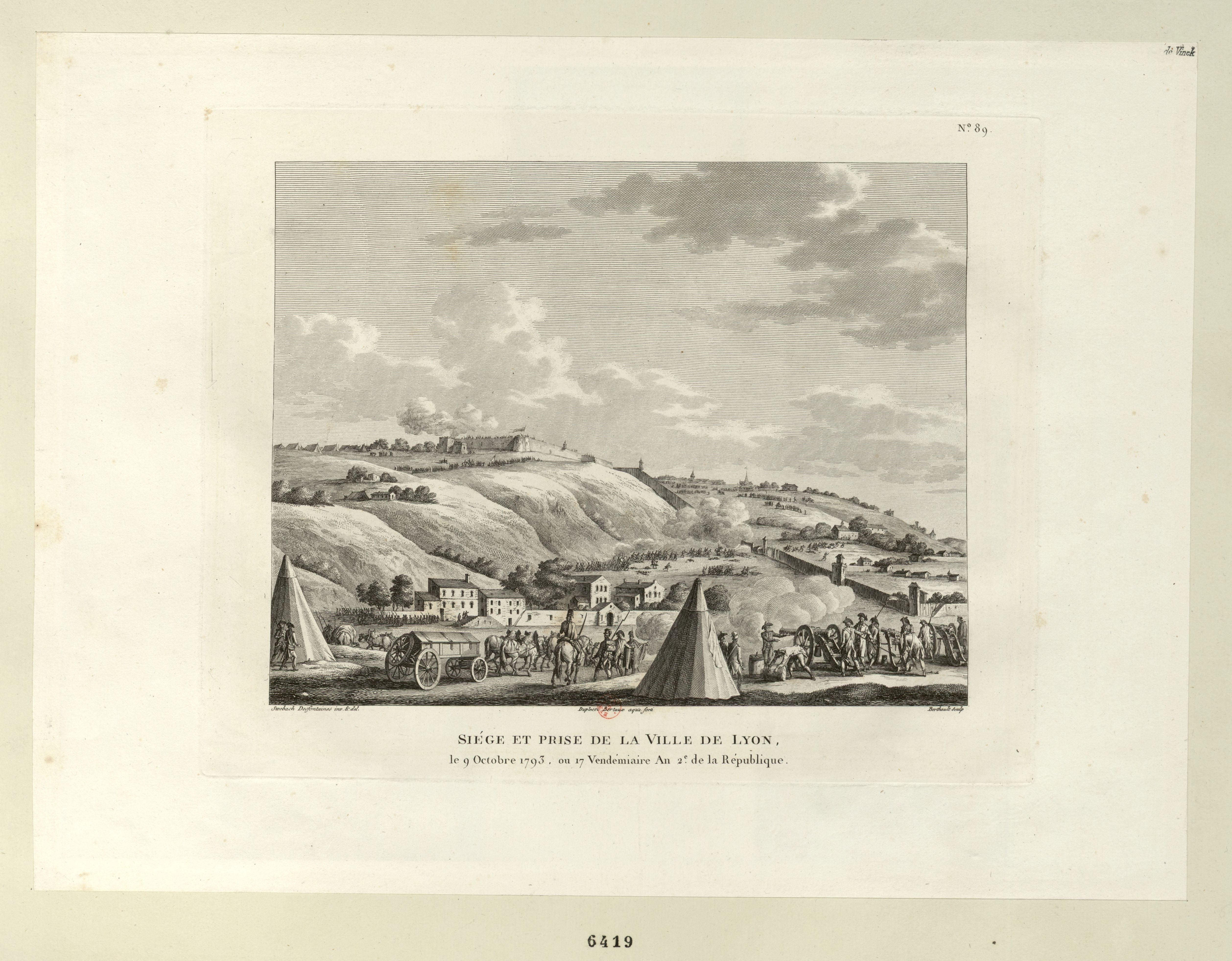 Siège et prise de la Ville de Lyon : le 9 Octobre 1793, ou 17 Vendemiaire An 2.e de la République.